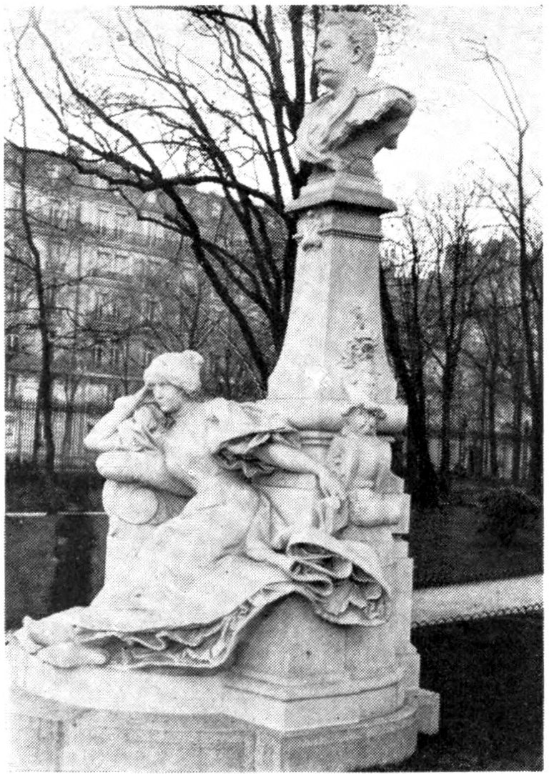 Buste de Guy de Maupassant pour le parc Monceau, Rouen, 1900 (détruit en 1941)